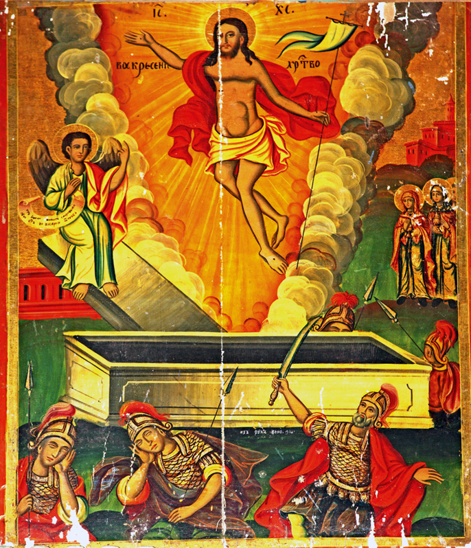 Икона в църквата "Свети Георги" в Жегляне.